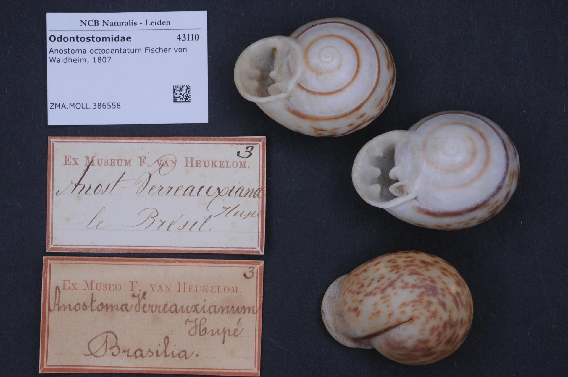 Anostoma octodentatum Fischer von Waldheim, 1807